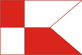 Vlajka obce Svidník